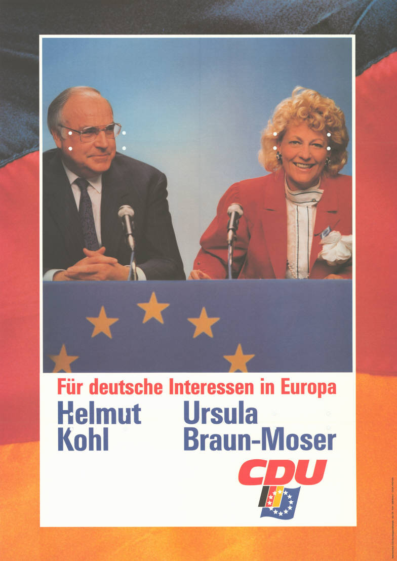 Für deutsche Interessen in Europa Helmut Kohl Ursula Braun-Moser CDUAbbildung:Porträtfoto mit Helmut Kohl vor Mikrofon - NationalfarbenPlakatart:Kandidaten-/Personenplakat mit PorträtAuftraggeber:Verantw.: CDU-Bundesgeschäftsstelle, Abt. Öffentlichkeitsarbeit, Konrad-Adenauer-Haus, BonnDrucker_Druckart_Druckort:KVD, KölnObjekt-Signatur:10-030 : 212Bestand:Europawahlplakate (10-030)GliederungBestand10-18:Europawahlplakate (10-030) » CDULizenz:KAS/ACDP 10-030 : 212 CC-BY-SA 3.0 DE